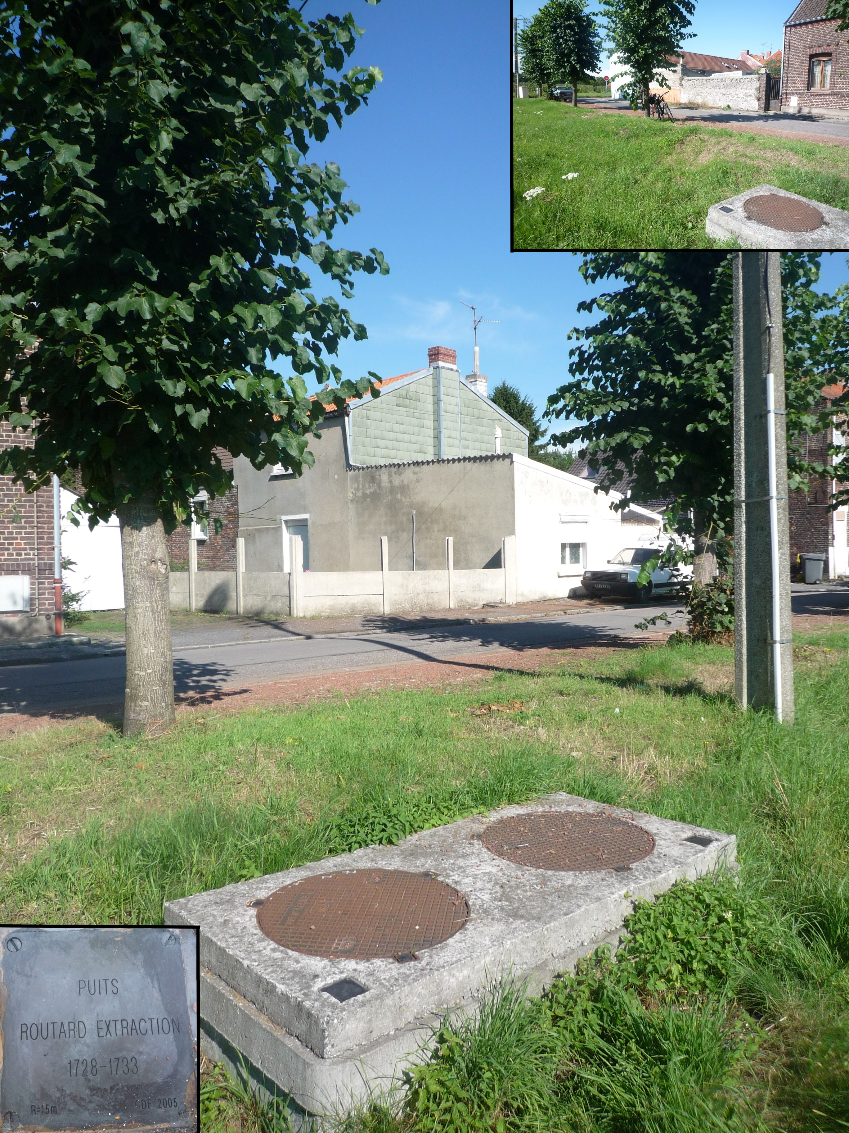 Puits Routard Extraction de la Compagnie des mines d'Anzin à Fresnes-sur-Escaut, Nord, Nord-Pas-de-Calais, France.